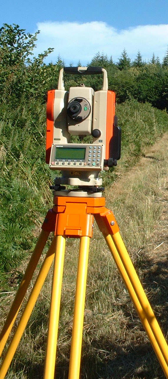 Station totale sur trépied